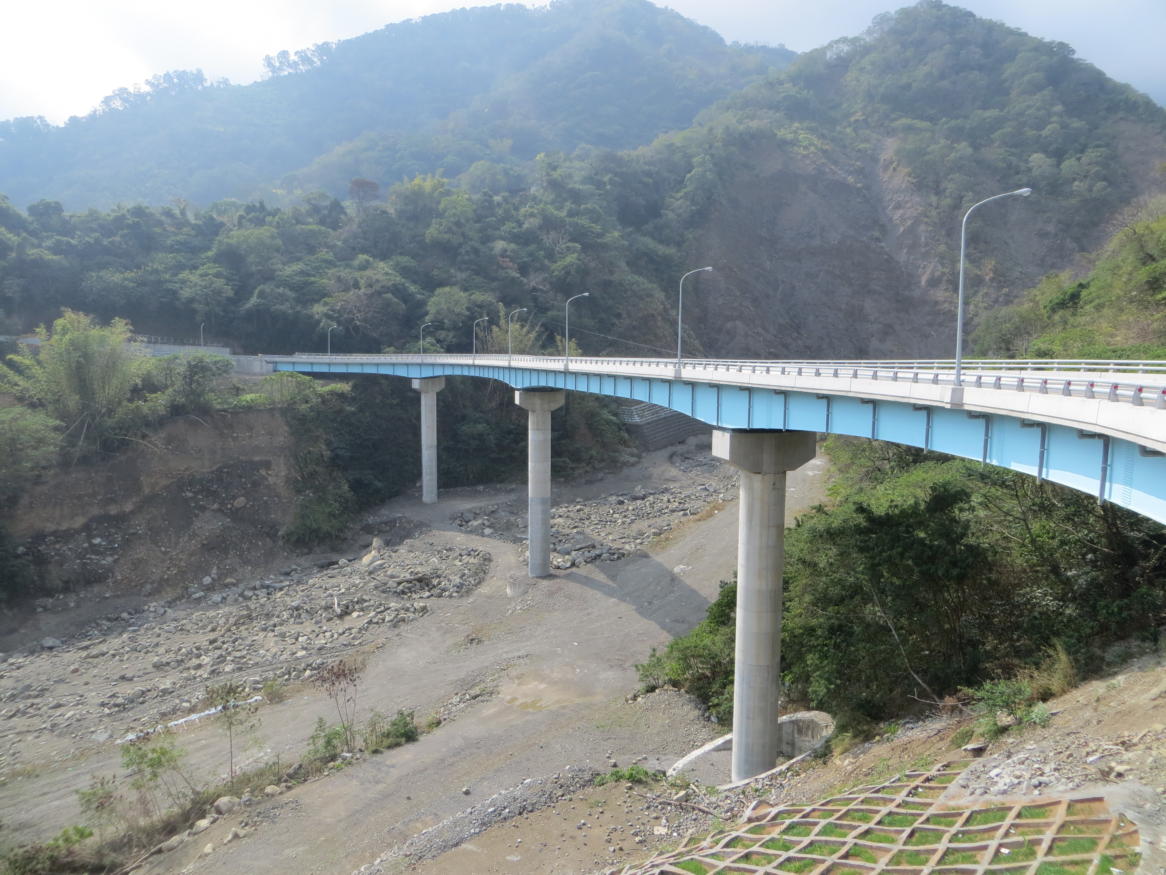 2013年改線通車的南橫綠茂橋，趨近截彎取直地改以大跨徑鋼橋跨越綠茂溪，取代了依山壁蜿蜒、高低起伏大、且飽受山崩之苦的舊線。朝寶來溫泉攝。